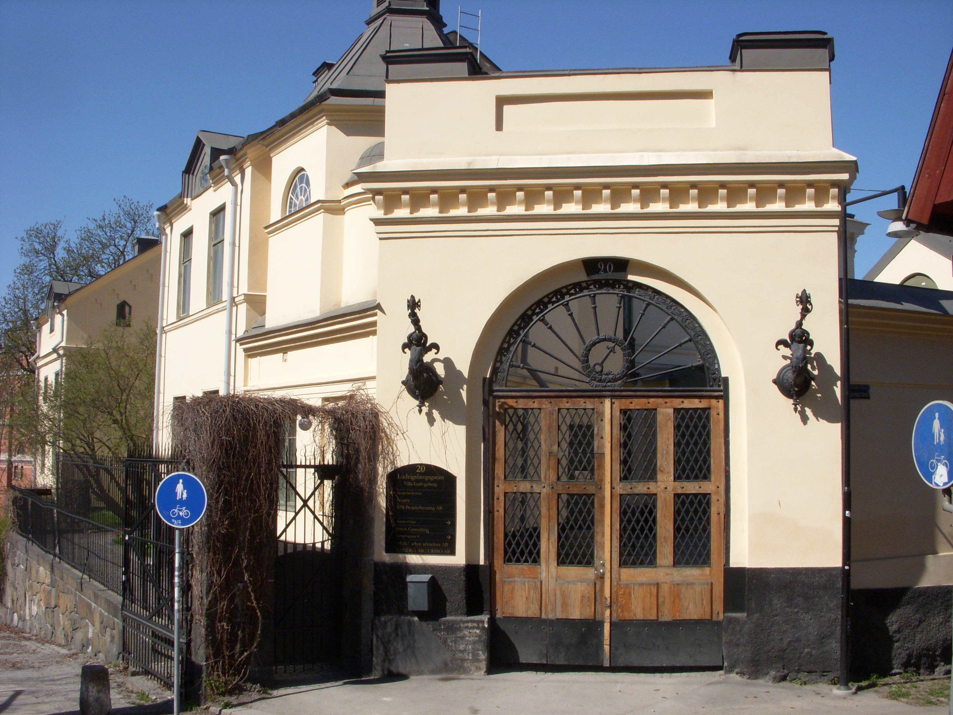 Villa Ludvigsberg, entréportal